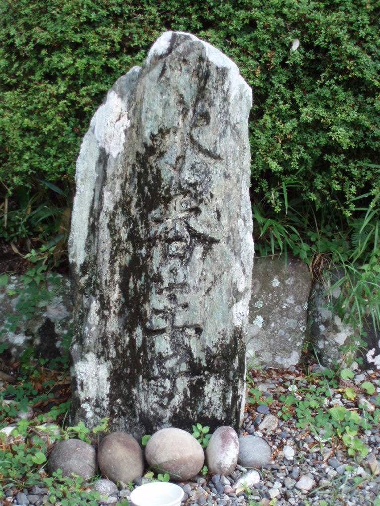 Monument_of_MIZUNOMI-oji_remains